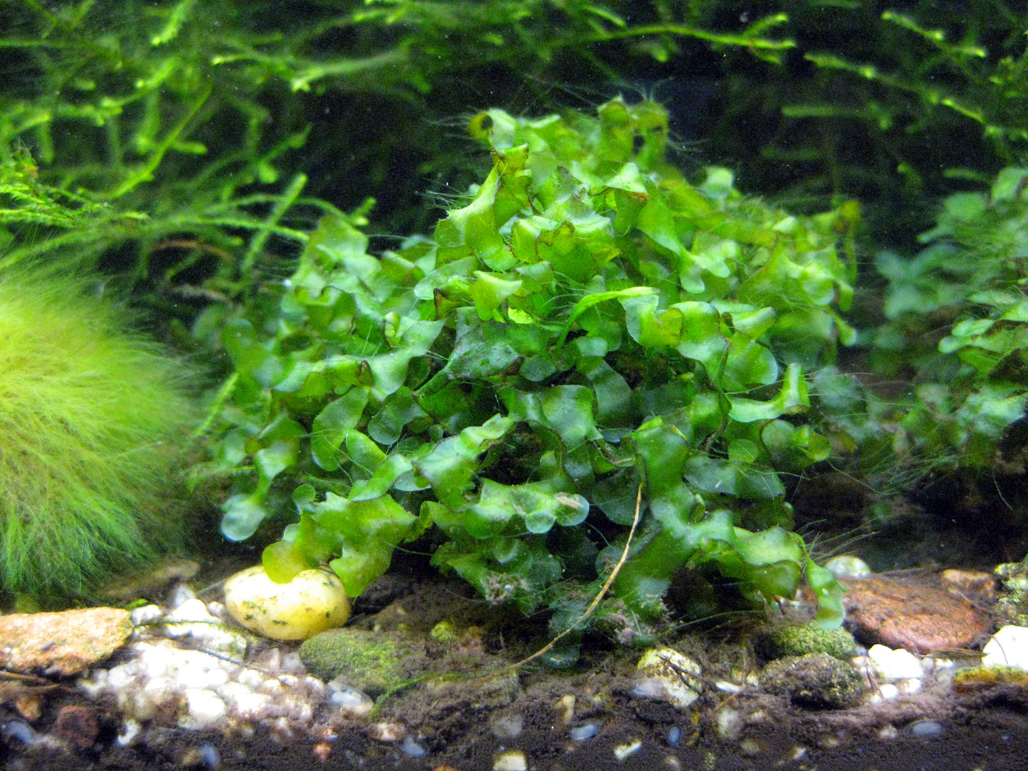 Prothallium von Microsorum pteropus (Javafarn)